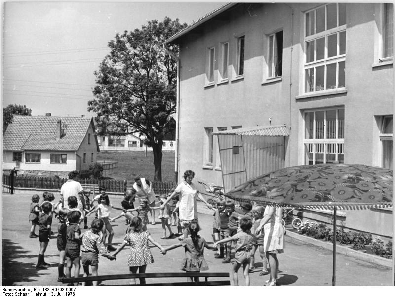 Westhausen, Blick auf den Kindergarten ADN-ZB Schaar 3.7.76 Bez. Suhl: 1200 Jahre Westhausen. Die 700 Einwohner zählende Gemeinde Westhausen im Kreis Hildburghausen feiert mit einer Festwoche vom 3. bis 11.7.76 ihr 1200jähiges Bestehen. Objekte im Wert von 2, 3 Millionen Mark wurden von den Bürgern von 1971 bis 1976 geschaffen, u.a. dieses Gebäude mit 60 Kindergarten- und 30 Krippenplätzen. Die erste urkundliche Erwähnung fand Westhausen im Jahre 776, als es mit Einwohnern und Leibeigenen im 8. Regierungsjahr Karls des Großen an das Stift in Fulda verschenkt wurde. (siehe 5 und 6 N)